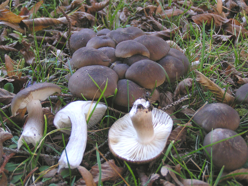 Lyophyllum decastes - Tricholomataceae - Agaricales